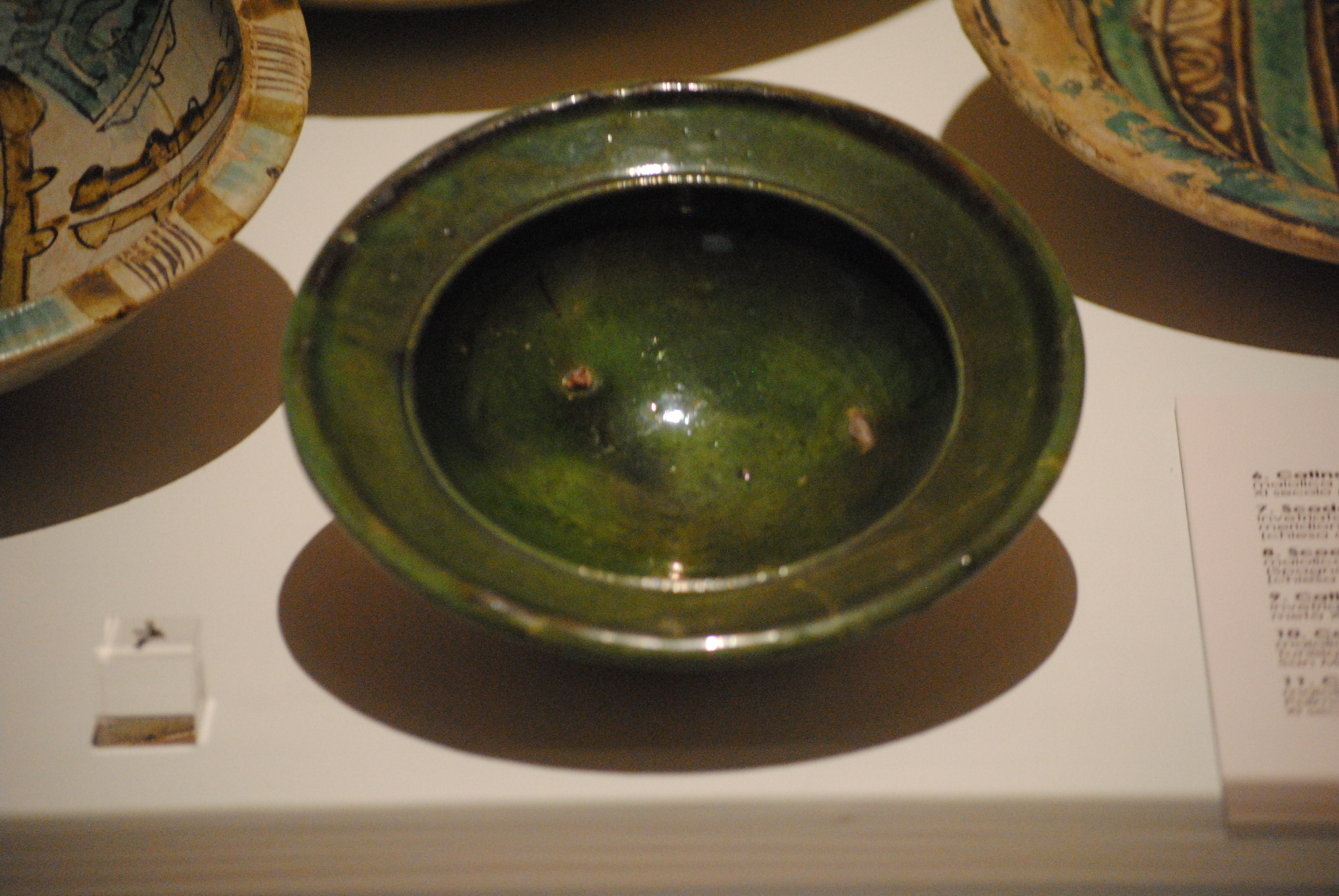 Scodella con tesa invetriata monocroma importata dall'al-Andalus e usata come bacino ceramico nell'ultimo quarto del XII secolo (chiesa di San Giovannino, Pisa) - Museo nazionale di San Matteo.